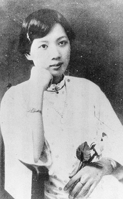 陳甜（陳精文）的肖像。